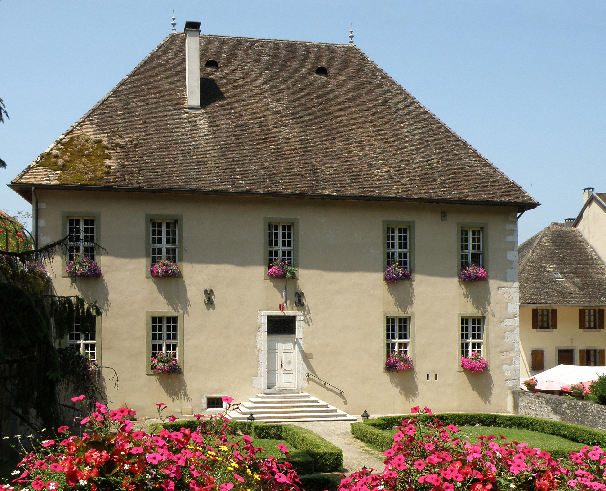 Chanaz, comm. de la Savoie (région Rhône-Alpes). Maison forte, dite maison de Boigne.